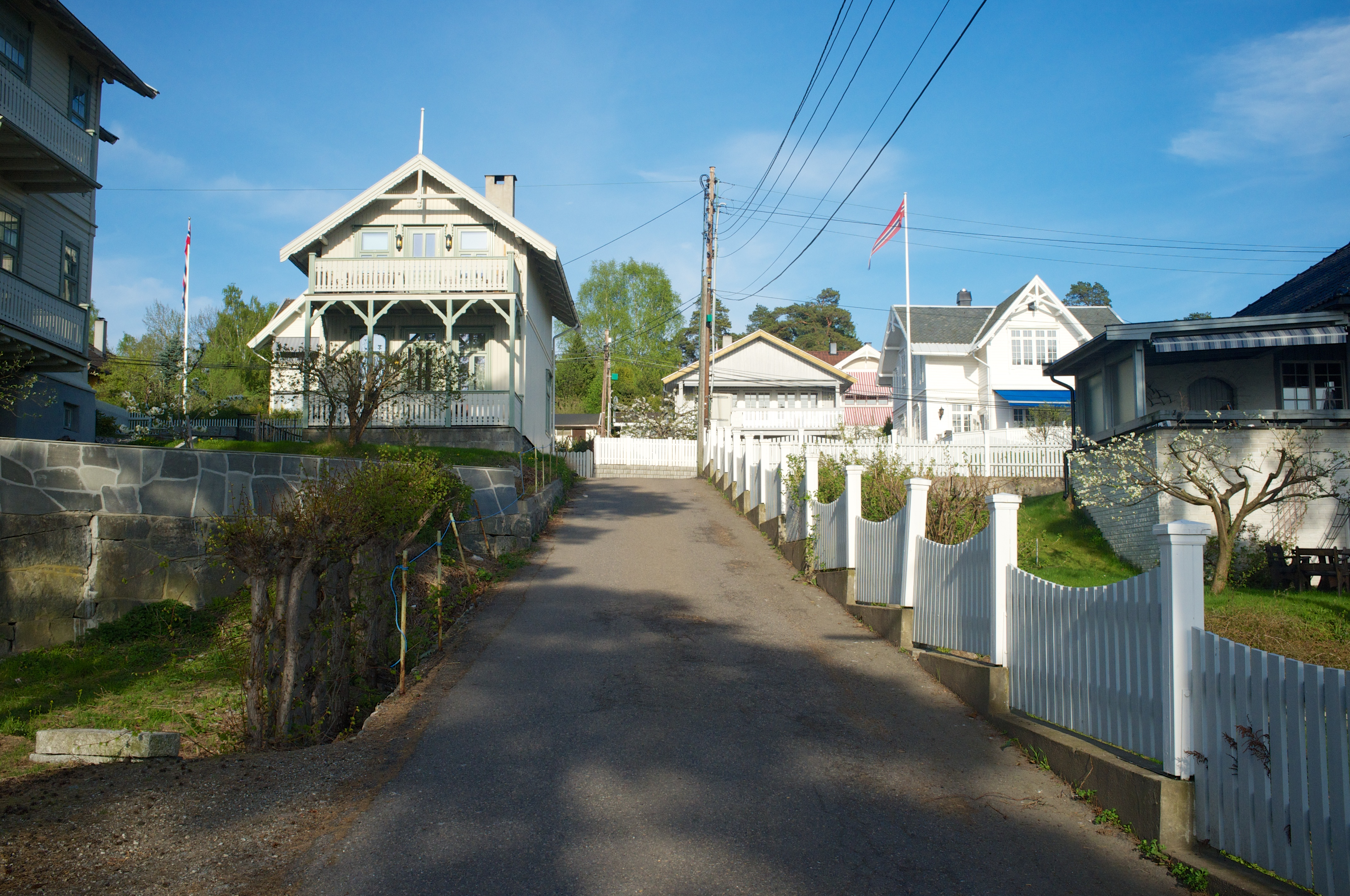 Spiralen på Nordstrand i Oslo.